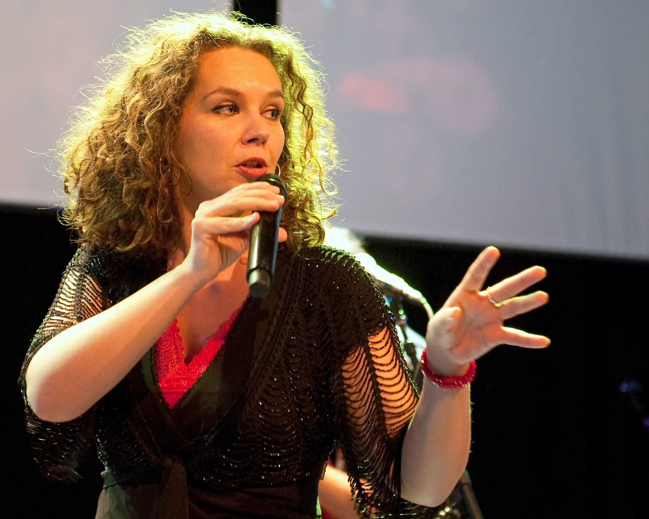 Het feest in Amsterdam was vooral niet politiek beladen. Halsema hield geen campagnepraatje voor GroenLinks, maar prees vooral de vrijheid van meningsuiting in het algemeen. De bijeenkomst bestond verder uit veel dans en optredens van onder andere Ellen ten Damme en Sara Kroos. Femke's #twist